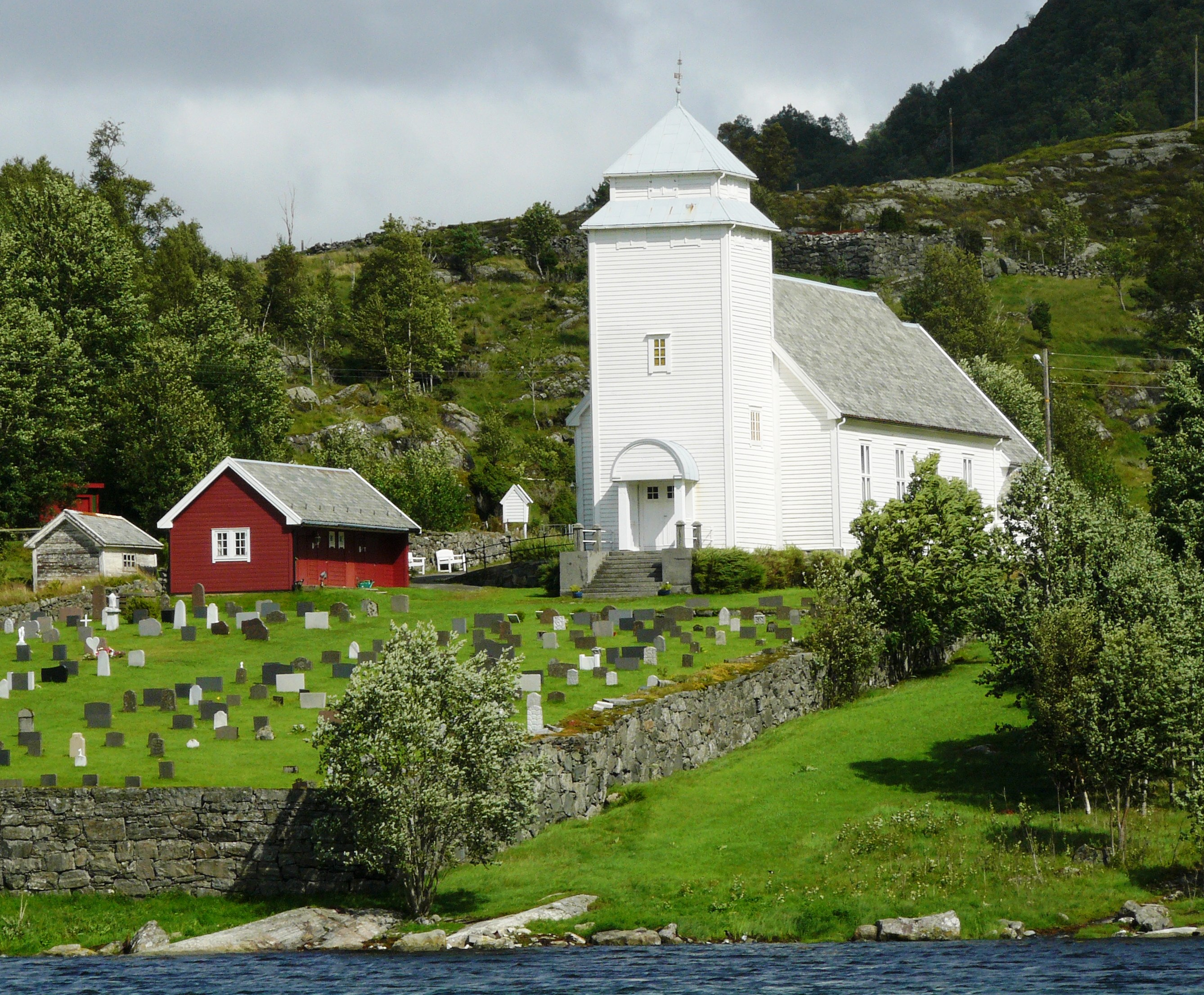 Rugsund church